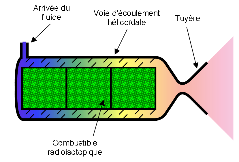 Schéma de fonctionnement d'un propulseur radioisotopique, ou poodle thruster